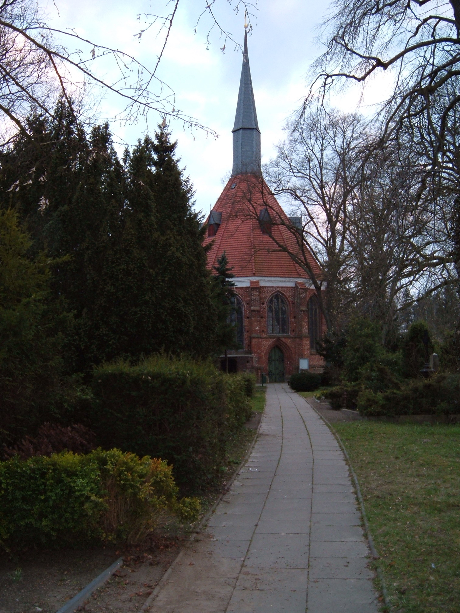 Gertrudenkapelle in Wolgast (Usedom)